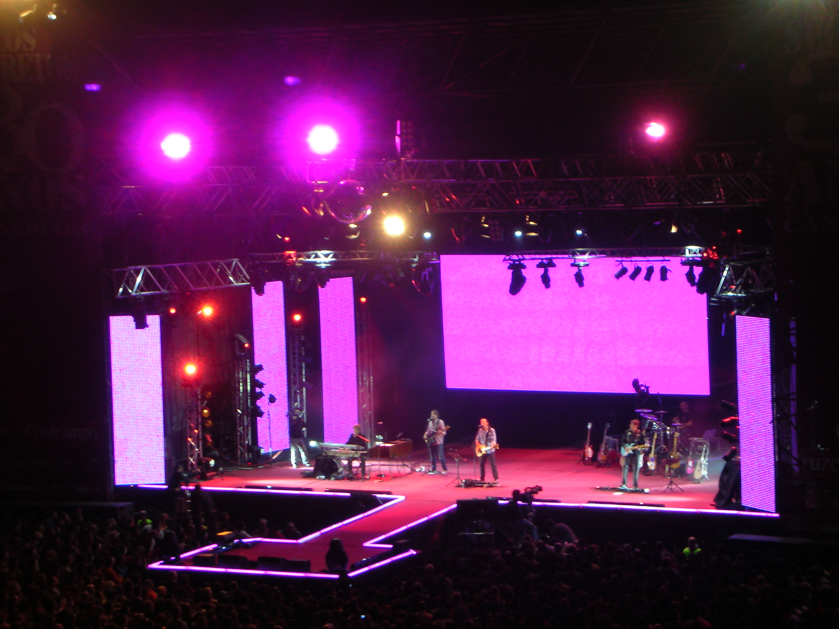 Los Secretos en el concierto de Las Ventas (Madrid) el 10 de octubre de 2008.